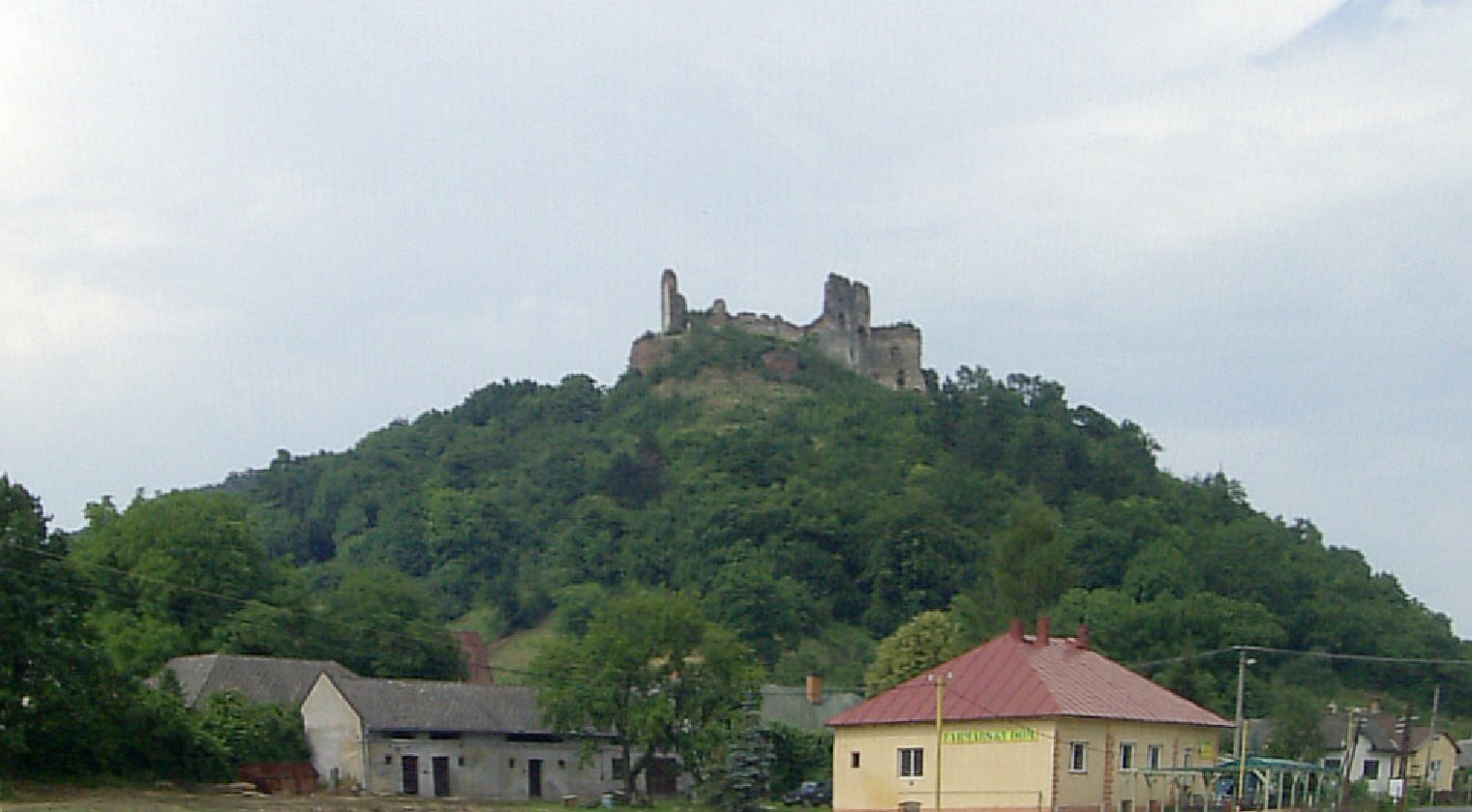 Čičava (hrad), obec Sedliská, Slovensko